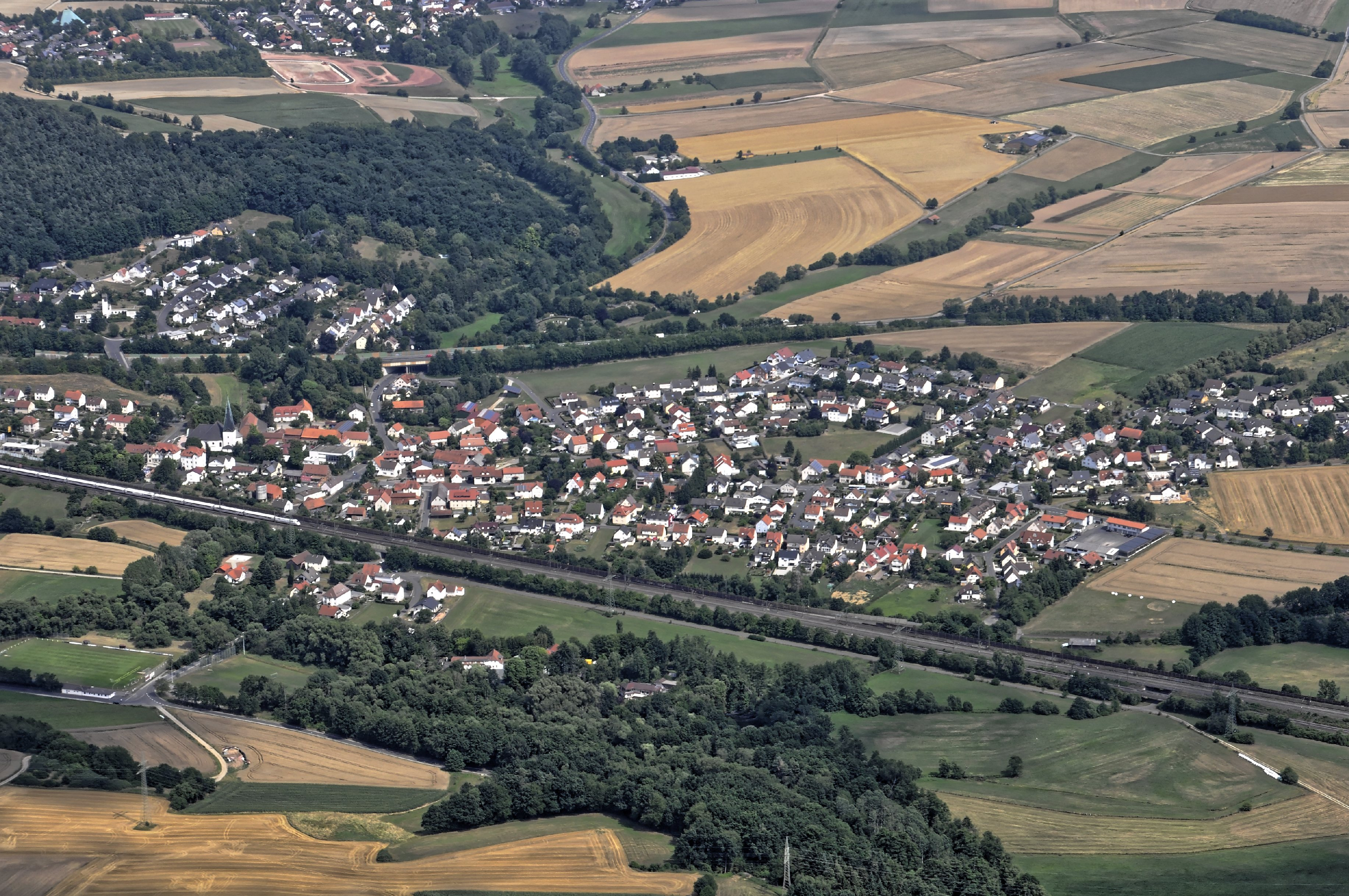 Bilder vom Flug Nordholz-Hammelburg 2015: Der Fuldaer Stadtteil Bronnzell.